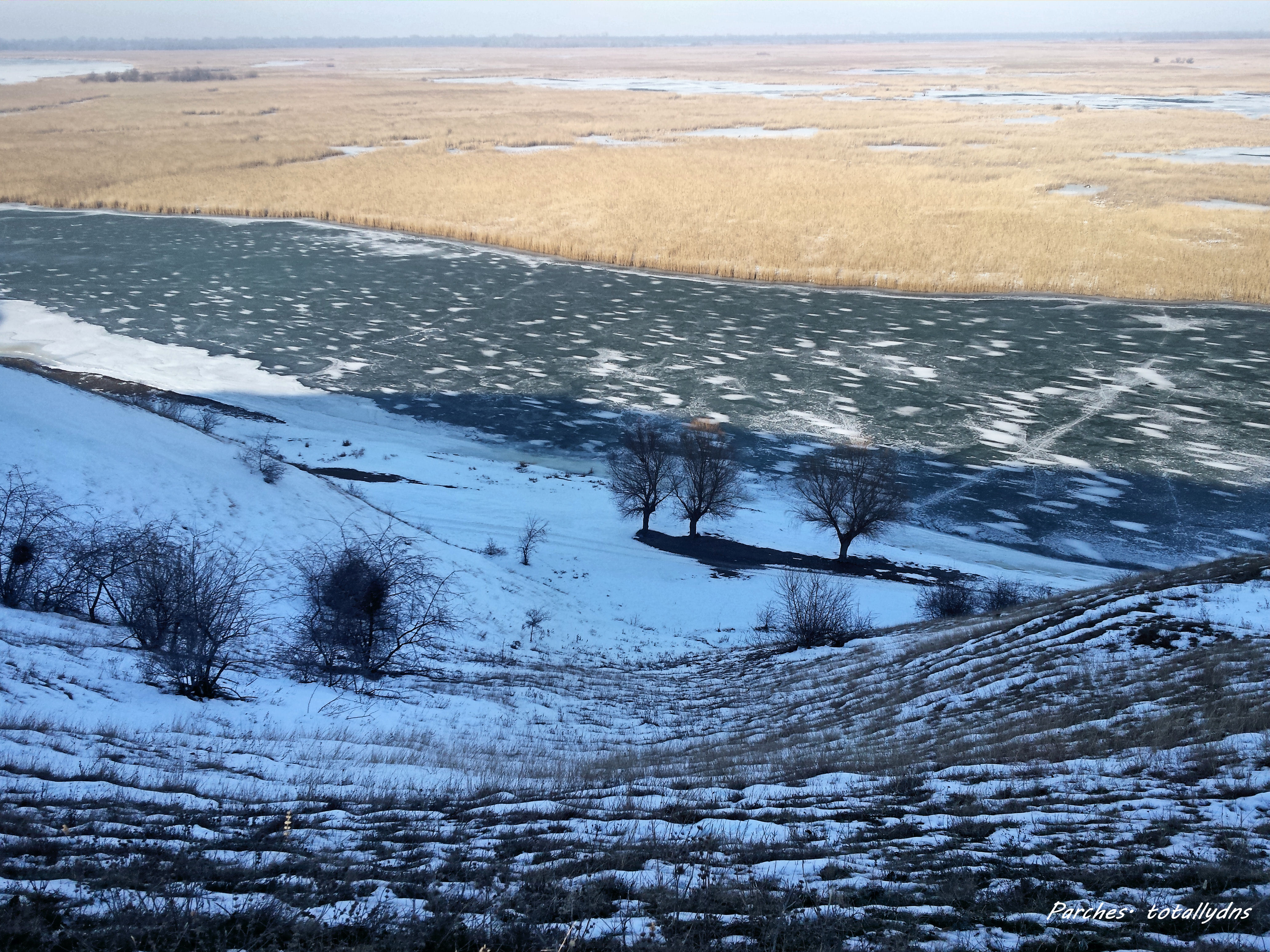 peisaj de iarna balta Parches